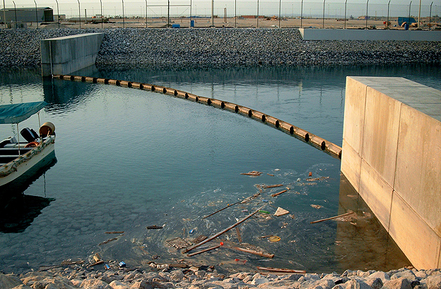 Schwimmende Tauchwand mit Uferbefestigung aus Beton